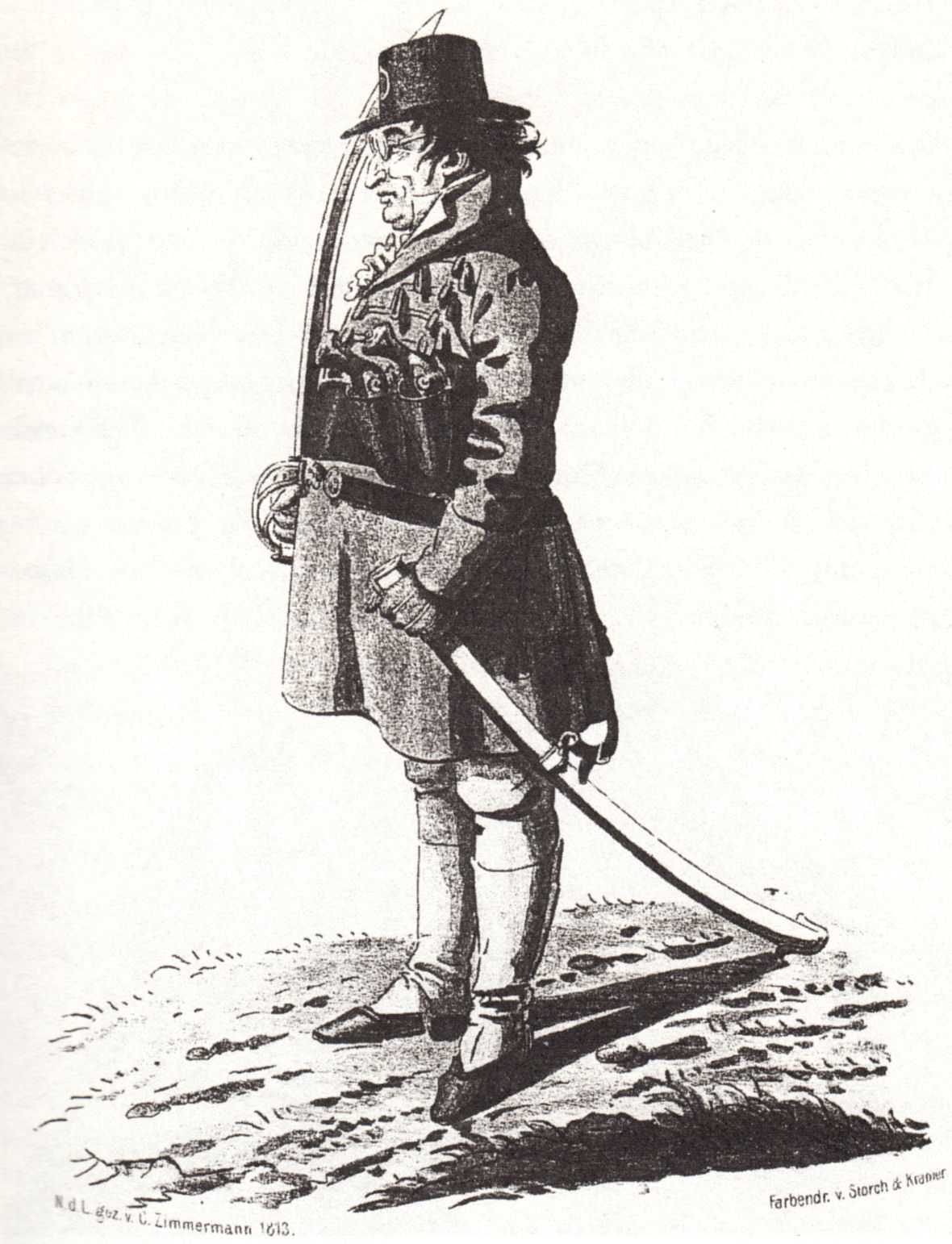 Johann G. Fichte Karikatur als Landsturmmannim Kampf gegen Napoleon)